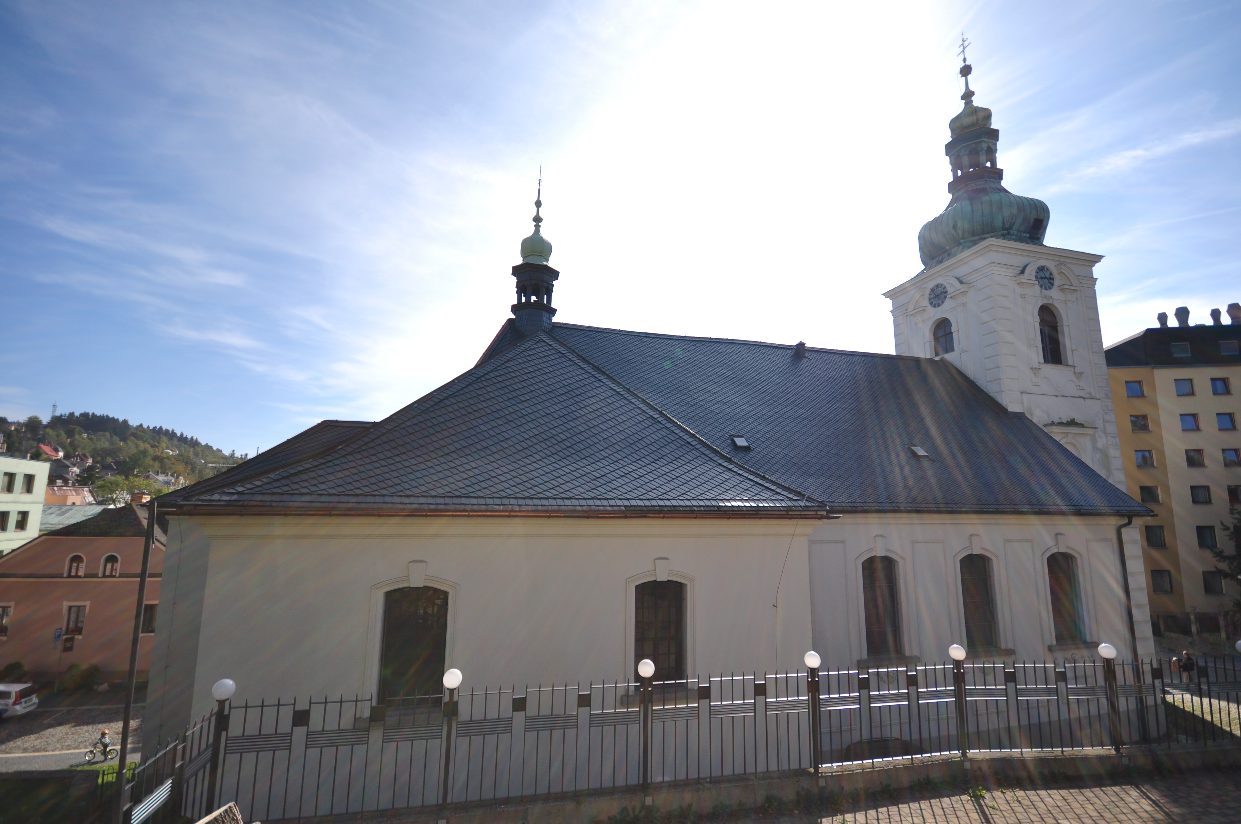 Kostel svaté Anny se sochou Panny Marie Karlovské a smírčím křížem, Kostelní, Anenské náměstí, Soukenná, Anenská, Jablonec nad Nisou.